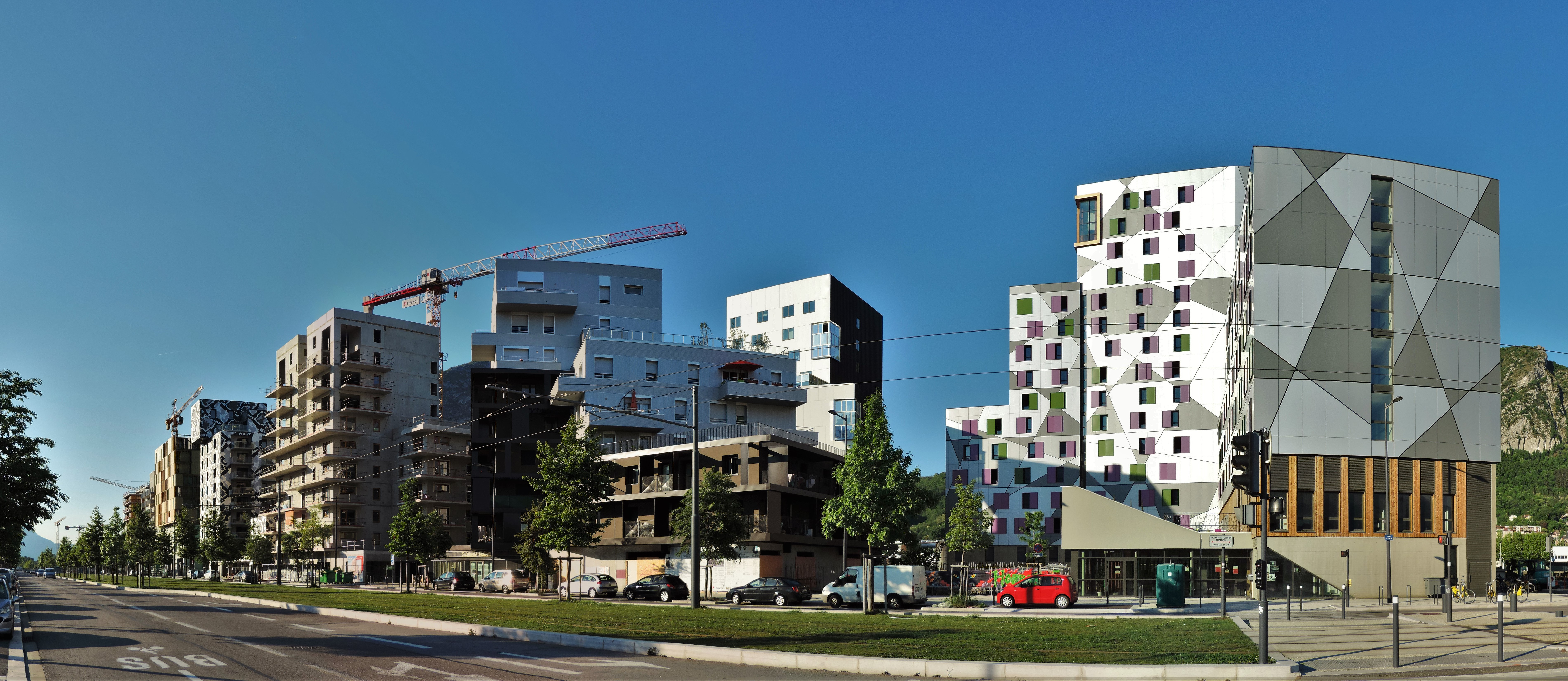 L'ilot Cambridge et l'avenue des Martyrs en 2017 sur la Presqu'île de Grenoble.